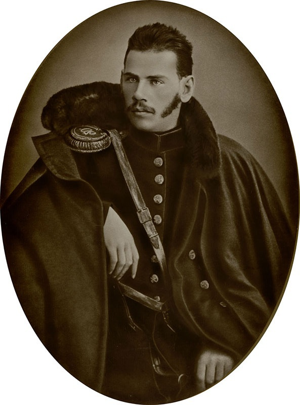 Лев Толстой – прапорщик. г. Москва. 1854